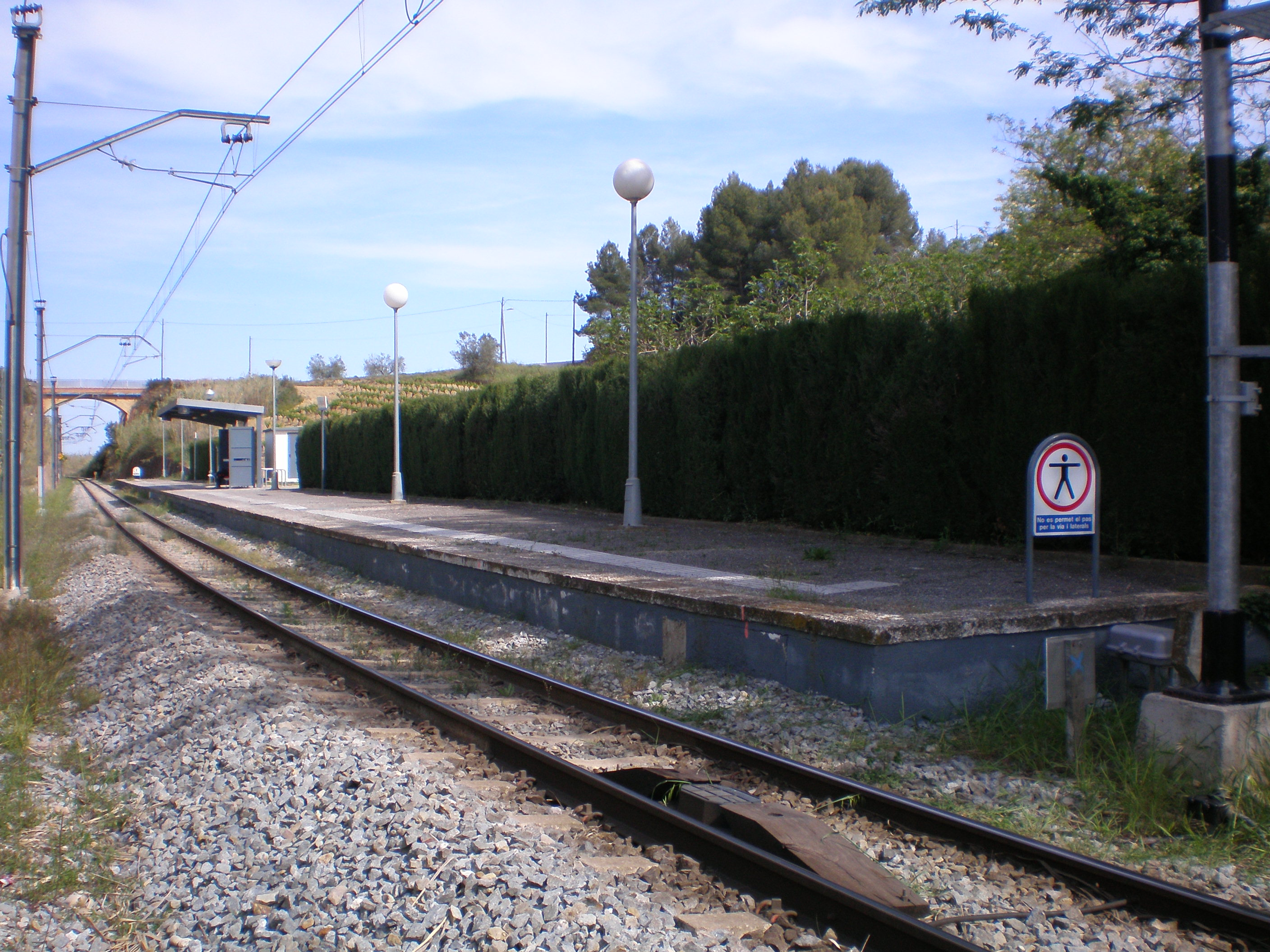 Vista de l'estació de La Beguda, que no consta de cap edifici de viatgers.